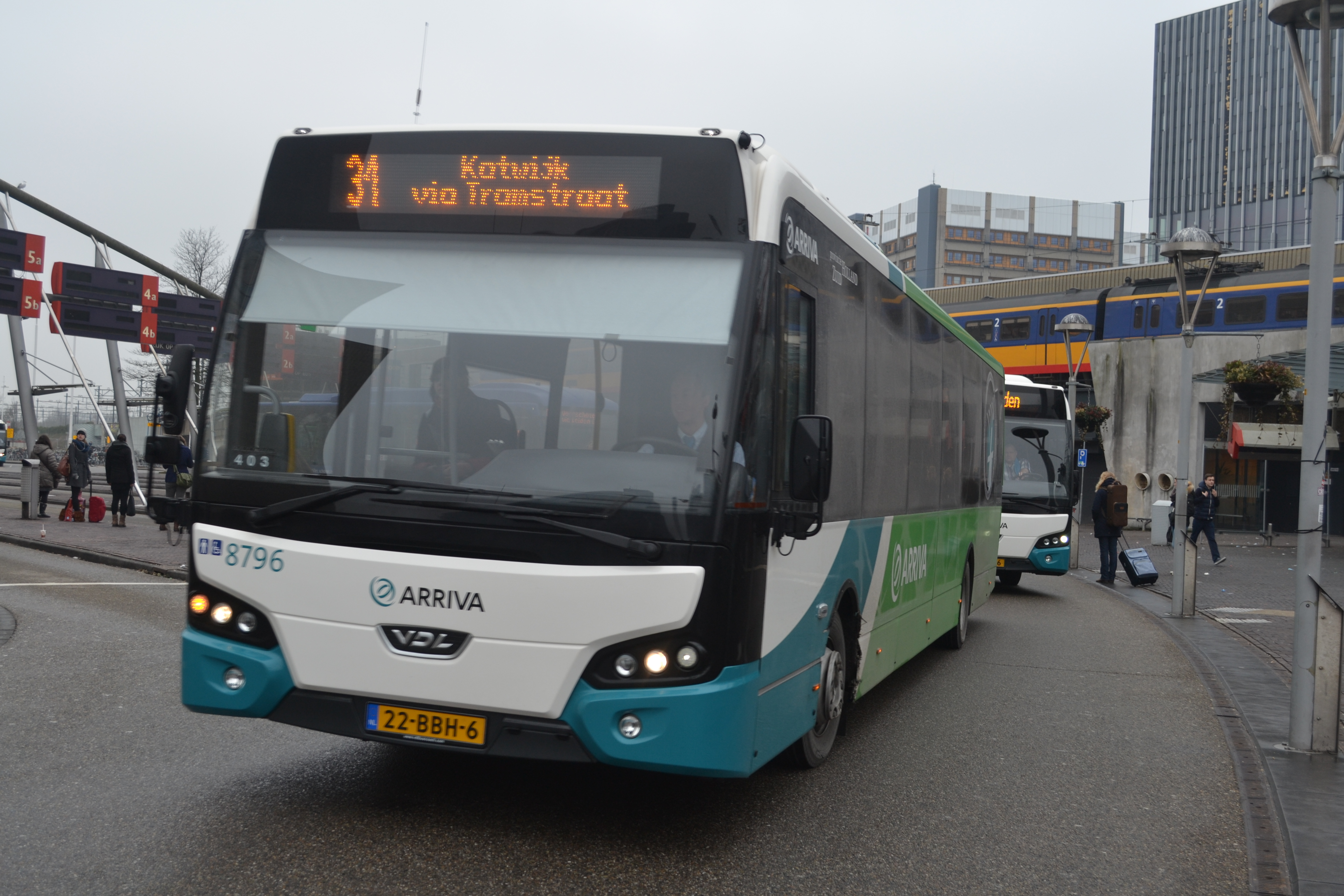 Arriva 8796 als lijn 31 te Leiden Centraal